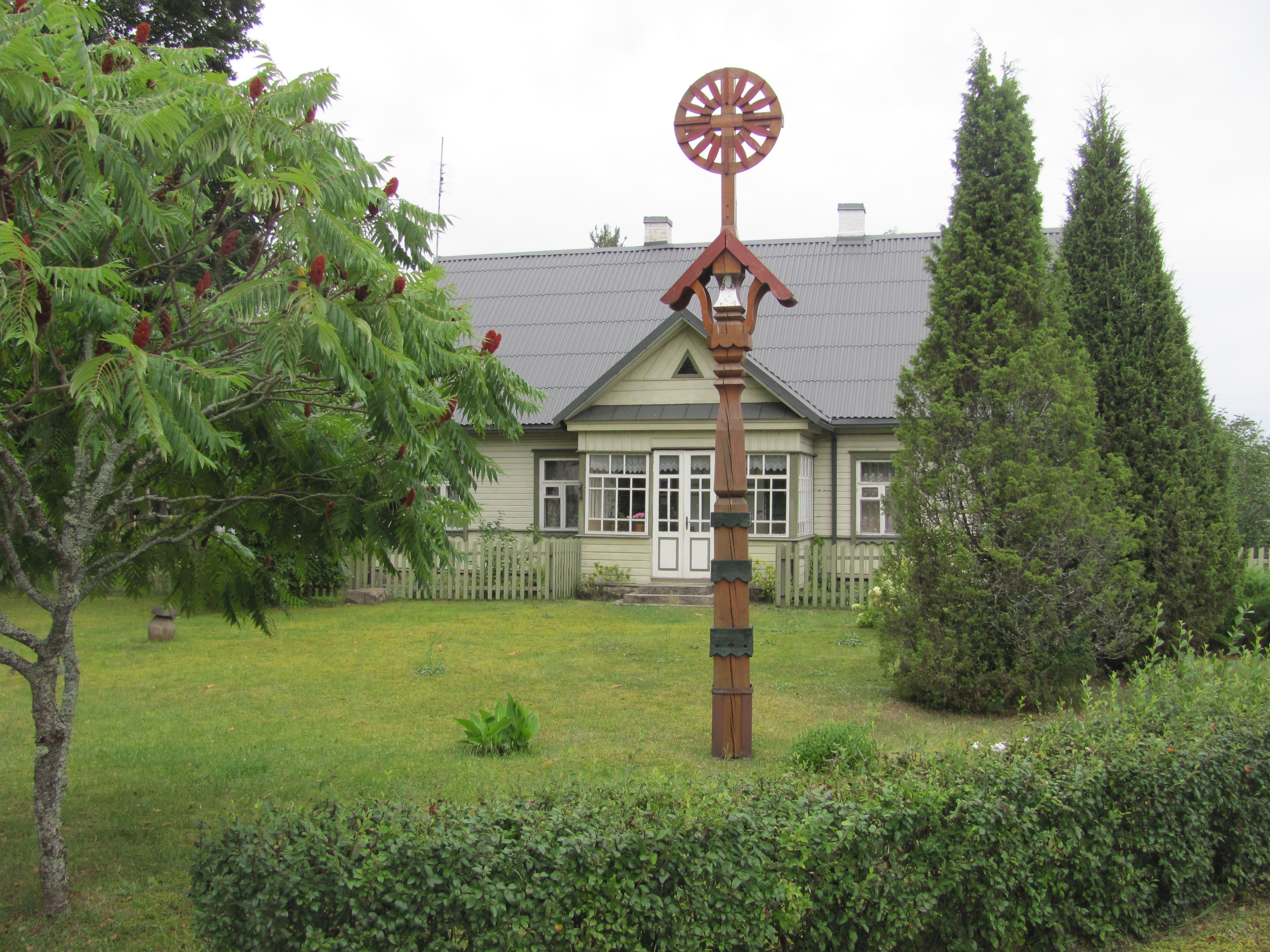 Švedriškė, Lithuania